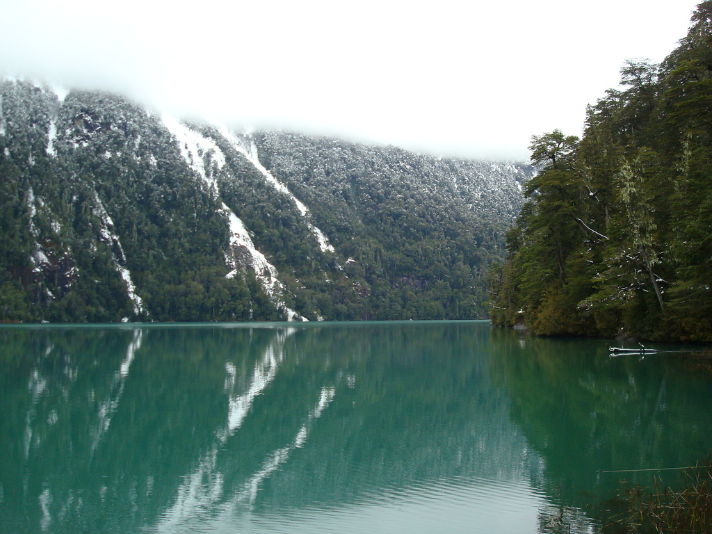 Lago Frias - Patagonia